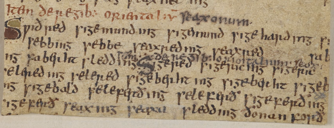 Généalogie des rois Swithred et Sigered d'Essex.